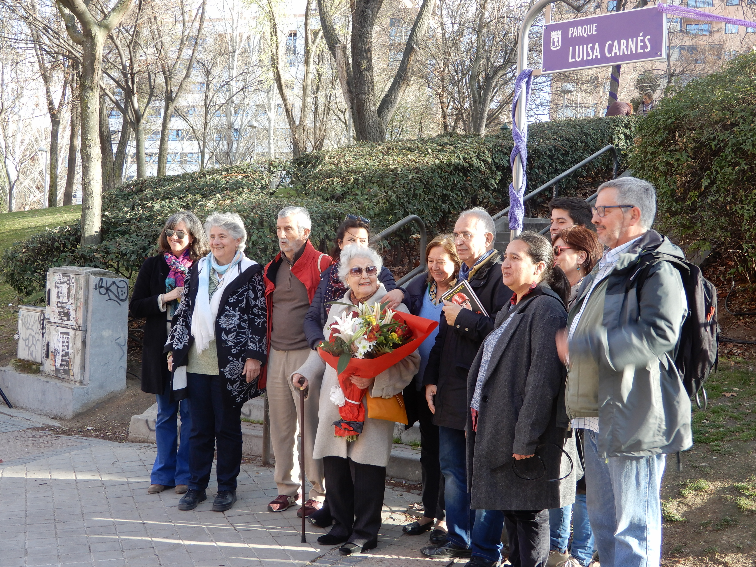 Familia, allegados y promotores del acto posan ante la placa tras la inauguración del Parque Luisa Carnés